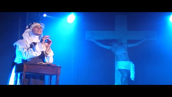 Rita riceve la stigmate